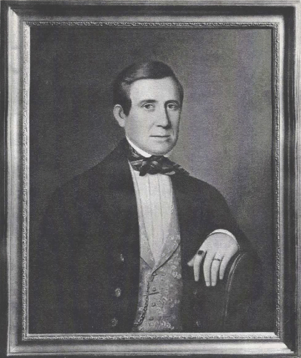 Jonas Litonius